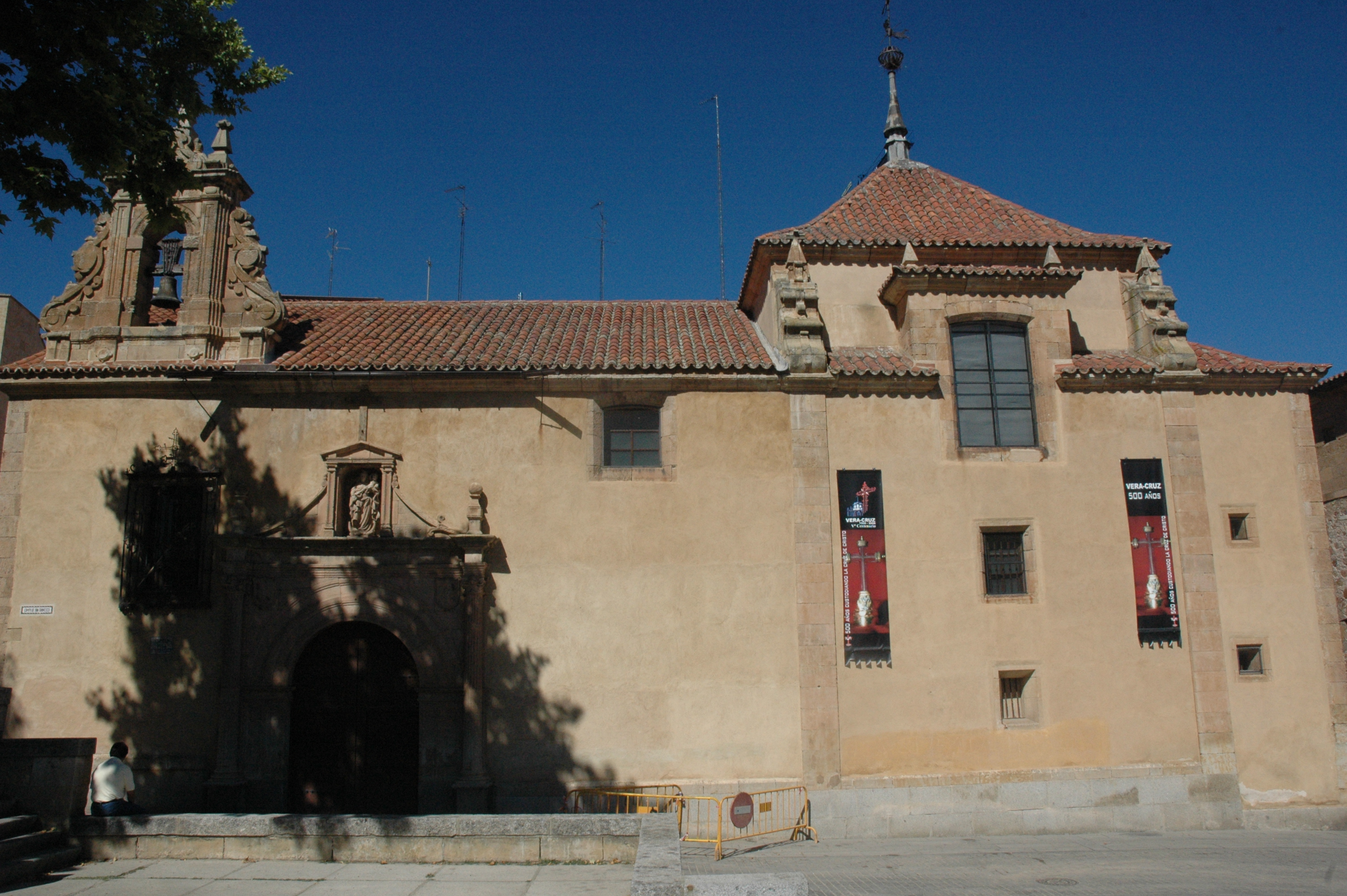 Ermita de la Santa Cruz. La Capilla de la Cofradía de la Vera Cruz. Exterior de la Capilla.